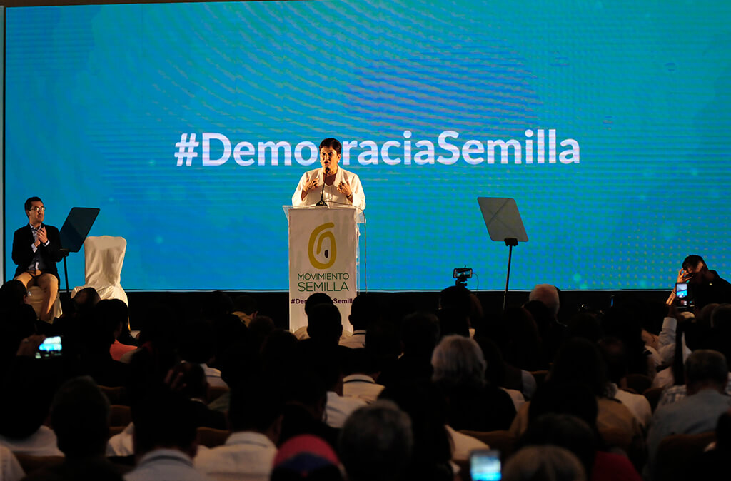 Asamblea General Movimiento Semilla.